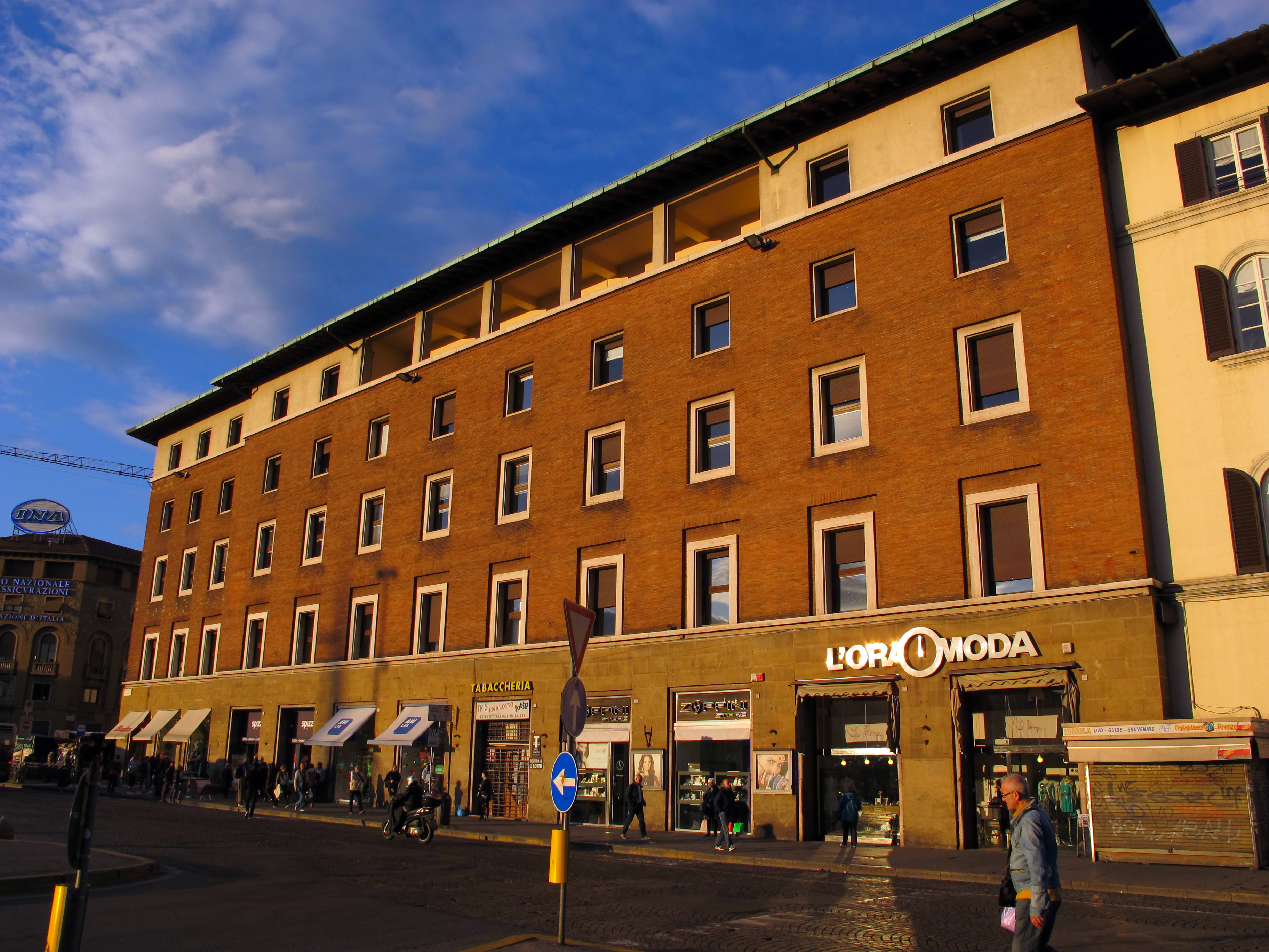 Piazza della stazione, fi